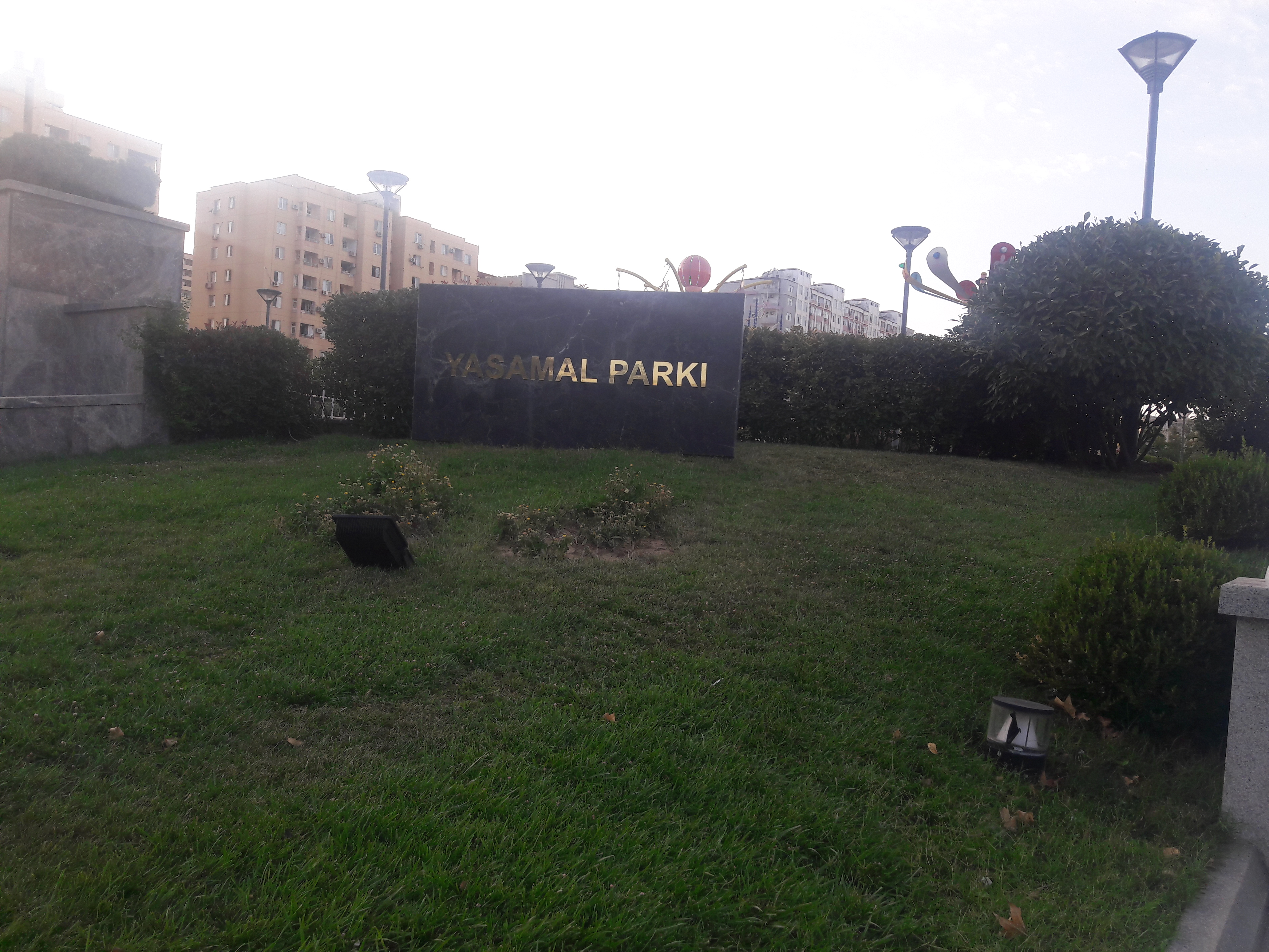 Yasamal parkının lövhəsi